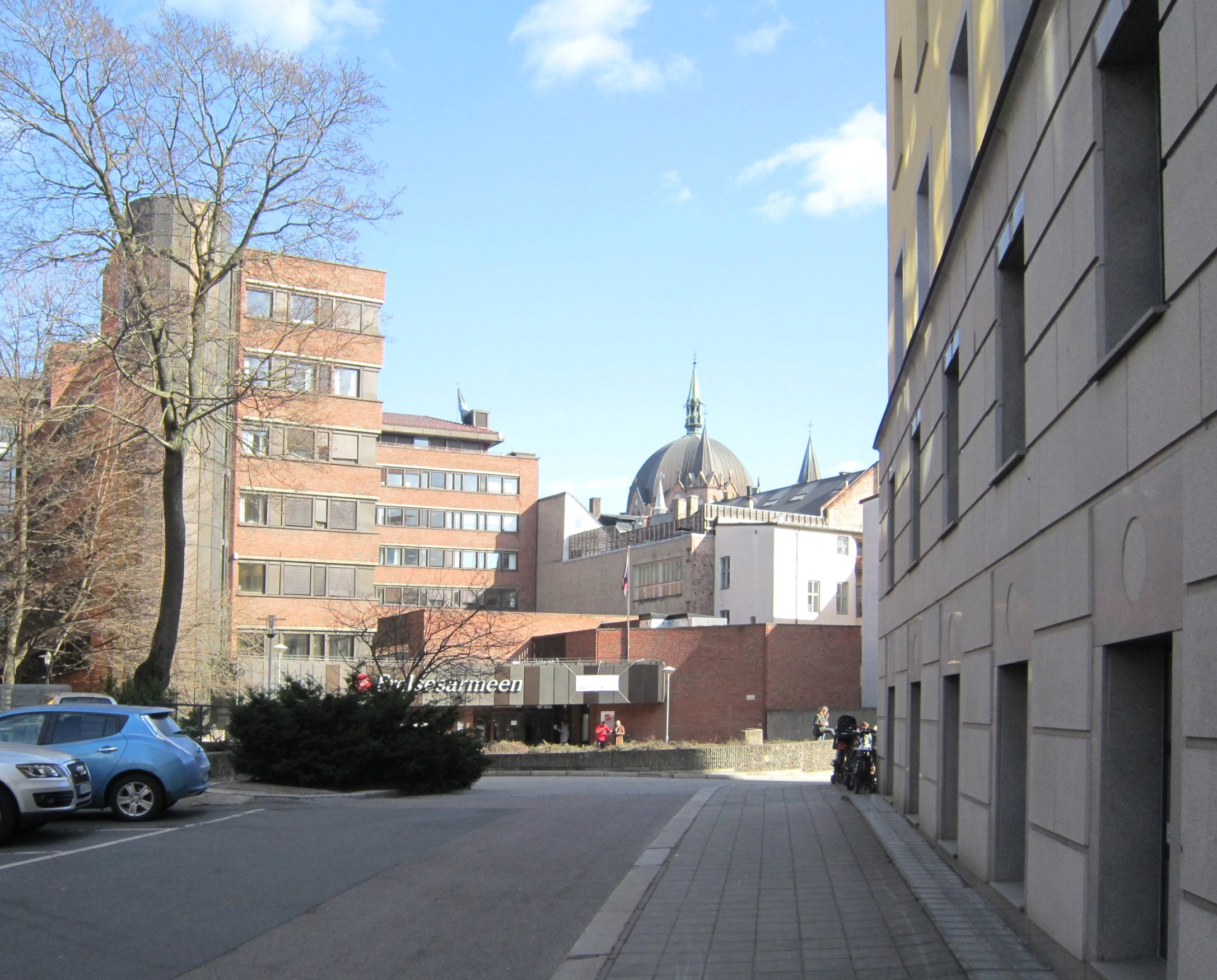 Bernhard Getz' gate mot Frelsesarmeens hovedkvarter